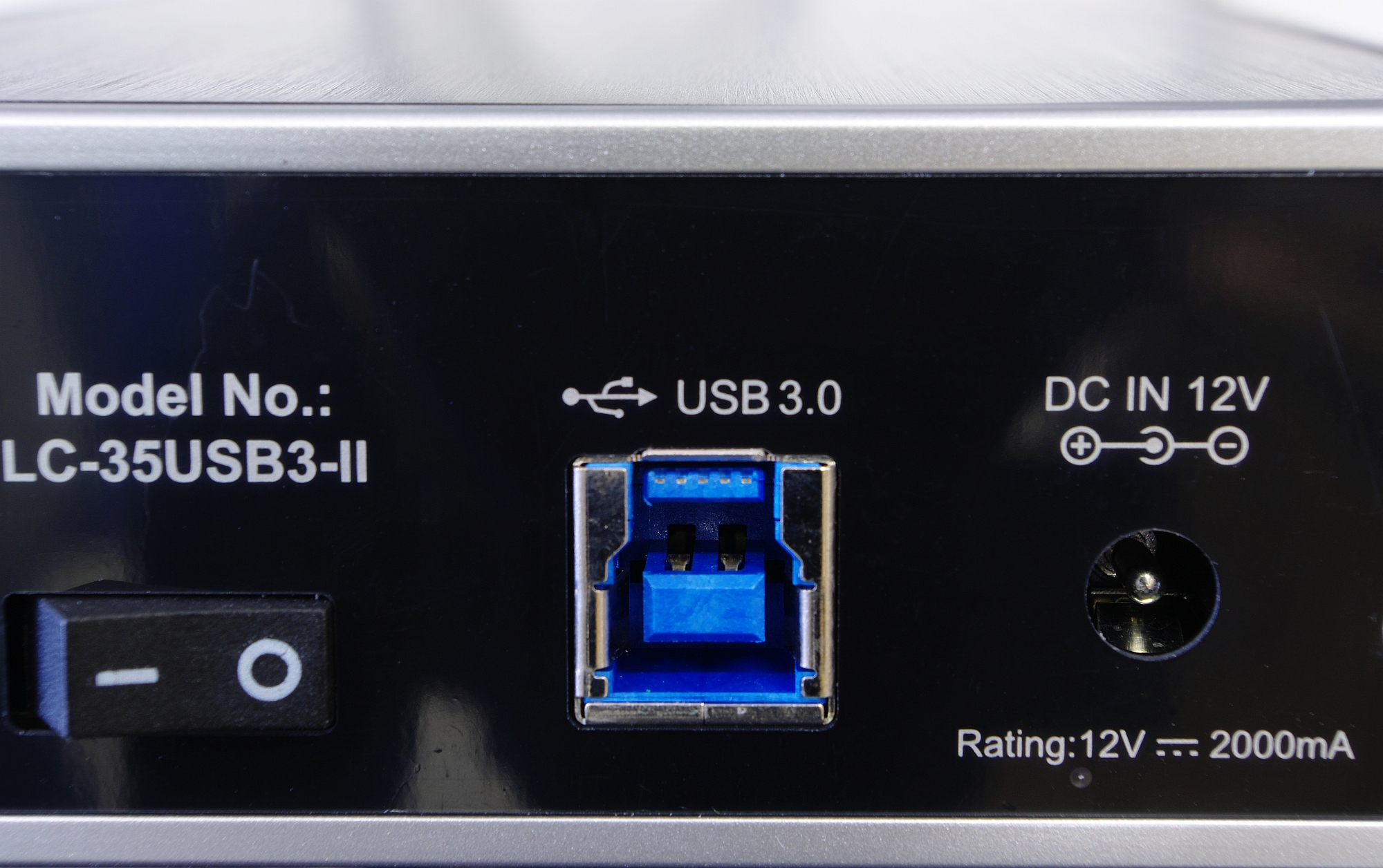 Anschlußpanel iener externen Festplatte mit USB3 Gerätebuchse Typ B